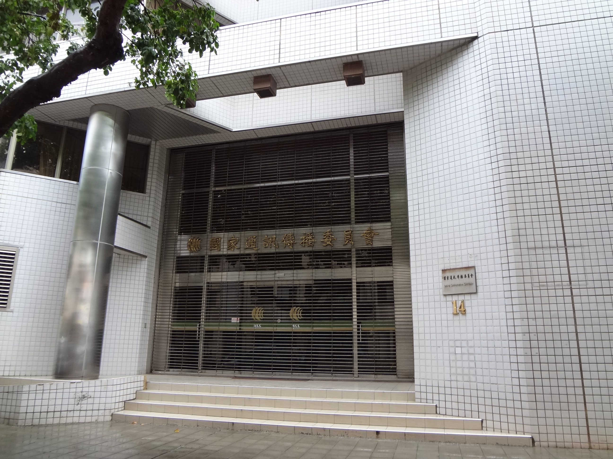 國家通訊傳播委員會臺北市濟南路辦公室，位於臺北市中正區濟南路二段14號，曾經是交通部電信總局本部。